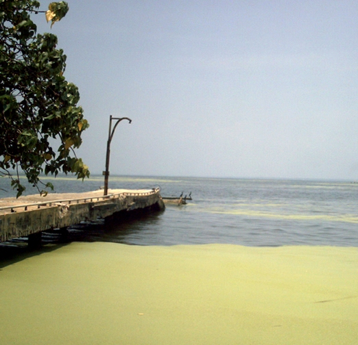 Panorámica del puente sobre el lago de maracaibo, se puede observar el nivel de contaminación de la Lemna obscura (Austin) Daubs, fotografía tomada desde el museo llamado "Visita tu Puente". Municipio San Francisco, Edo. Zulia, Venezuela.